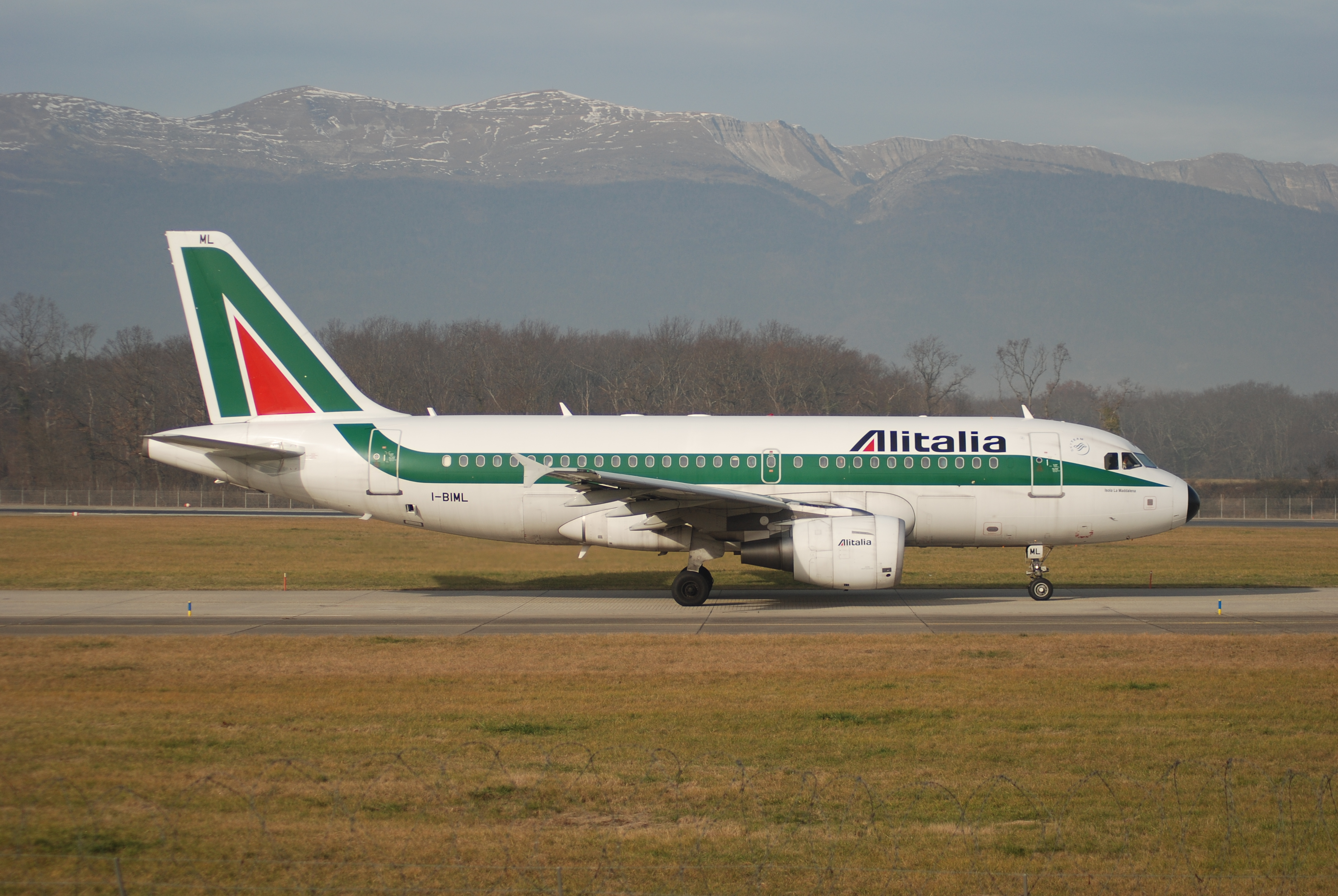 Alitalia Airbus A319; I-BIML@GVA;30.12.2006/445ie